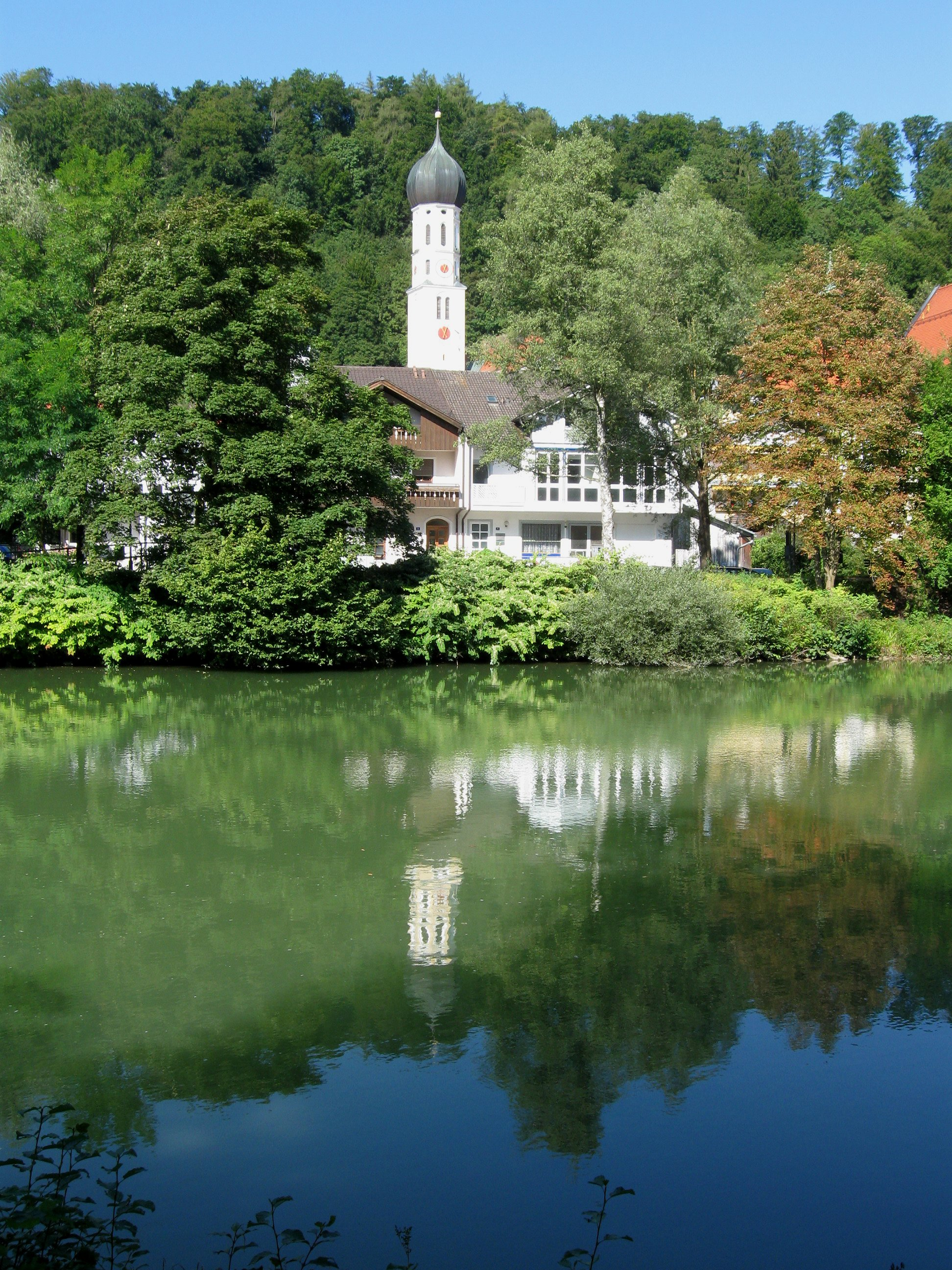 St. Andreas, katholische Stadtpfarrkirche. Erbaut 1484, nach Brand bis 1631 erneuert, um 1680 barockisiert.